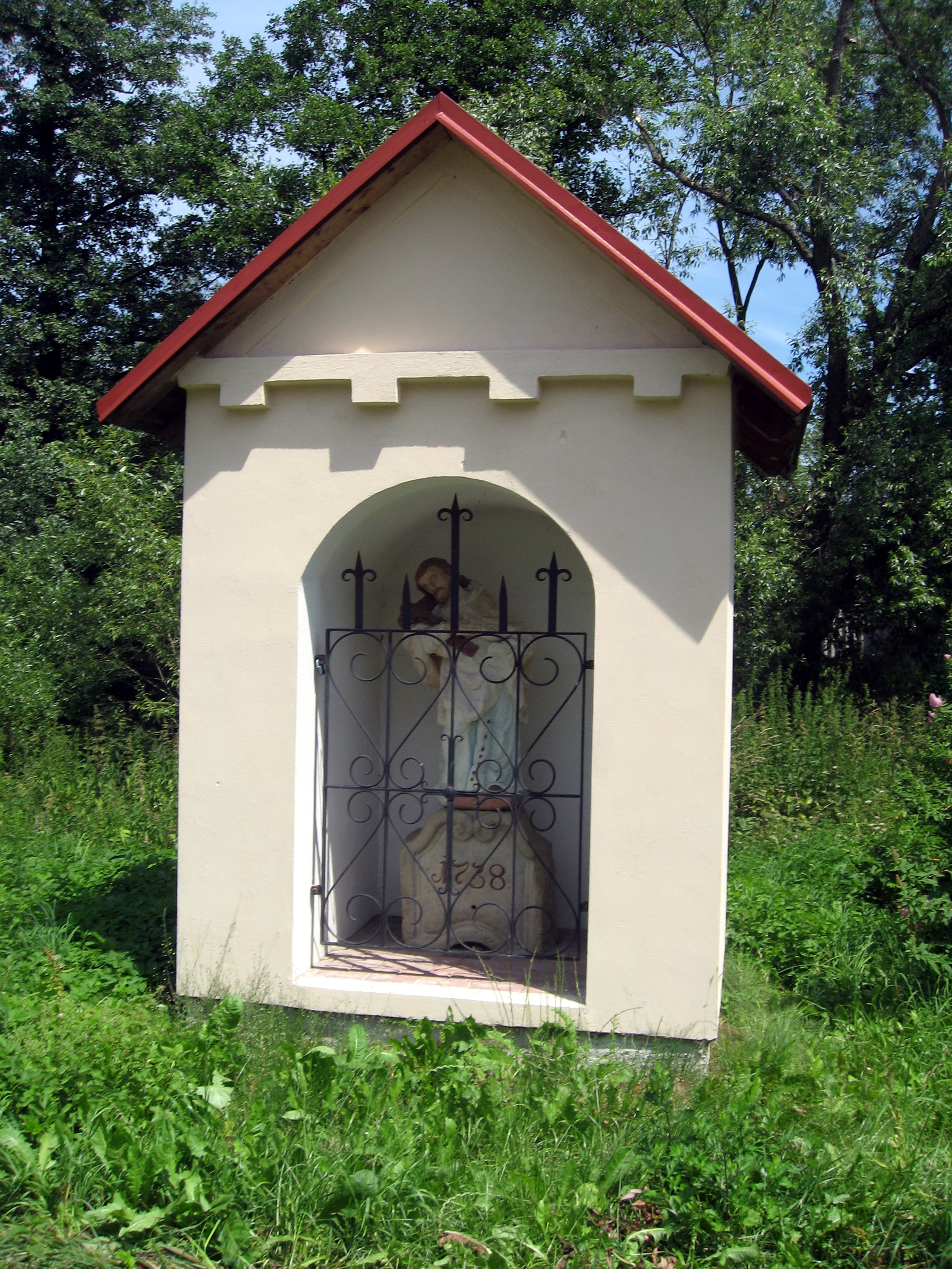 Okrouhlice